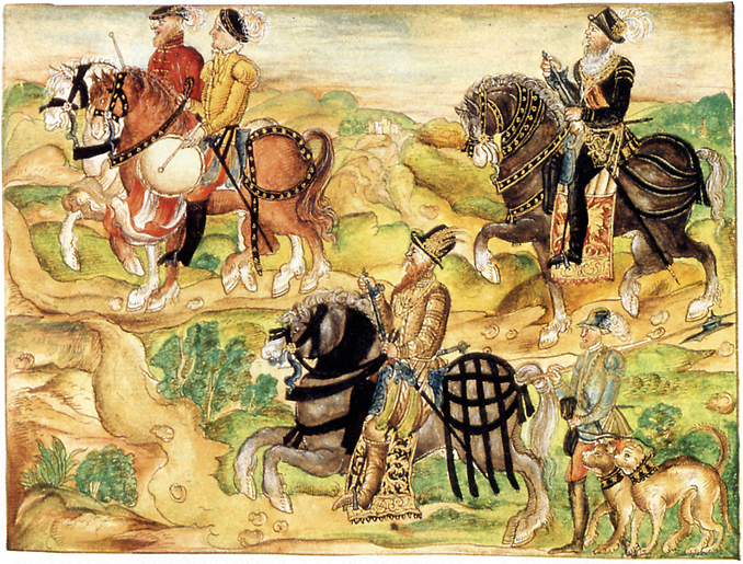 Gouverneur Georg Hohermuth von Speyer (rechts) und Philipp von Hutten (Mitte) anläßlich der Musterung der Welser-Armada in Sanlúcar de Barrameda vor der Einschiffung nach Venezuela. Kolorierte Zeichnung von Hieronymus Köler d. Ä. (um 1560). Das Bild entstammt einer ab 1537 geschriebenen Reisebeschreibung Kölers. Der zugehörige Text lautet: „Zum dritten und mittlerm Tayl, do wir ins Land kemen und hindurch rucken müesten, darzu waren die öbersten Hauptleut, nemblich Sengnor Capitani Jörg Hohermueth von Memingen und neben ime der edel und handvest Herr Phillips von Hutten und Pirckenfeld sampt iren Heertrumeln, Vorreutern, auß zweyhundert zu Roß“